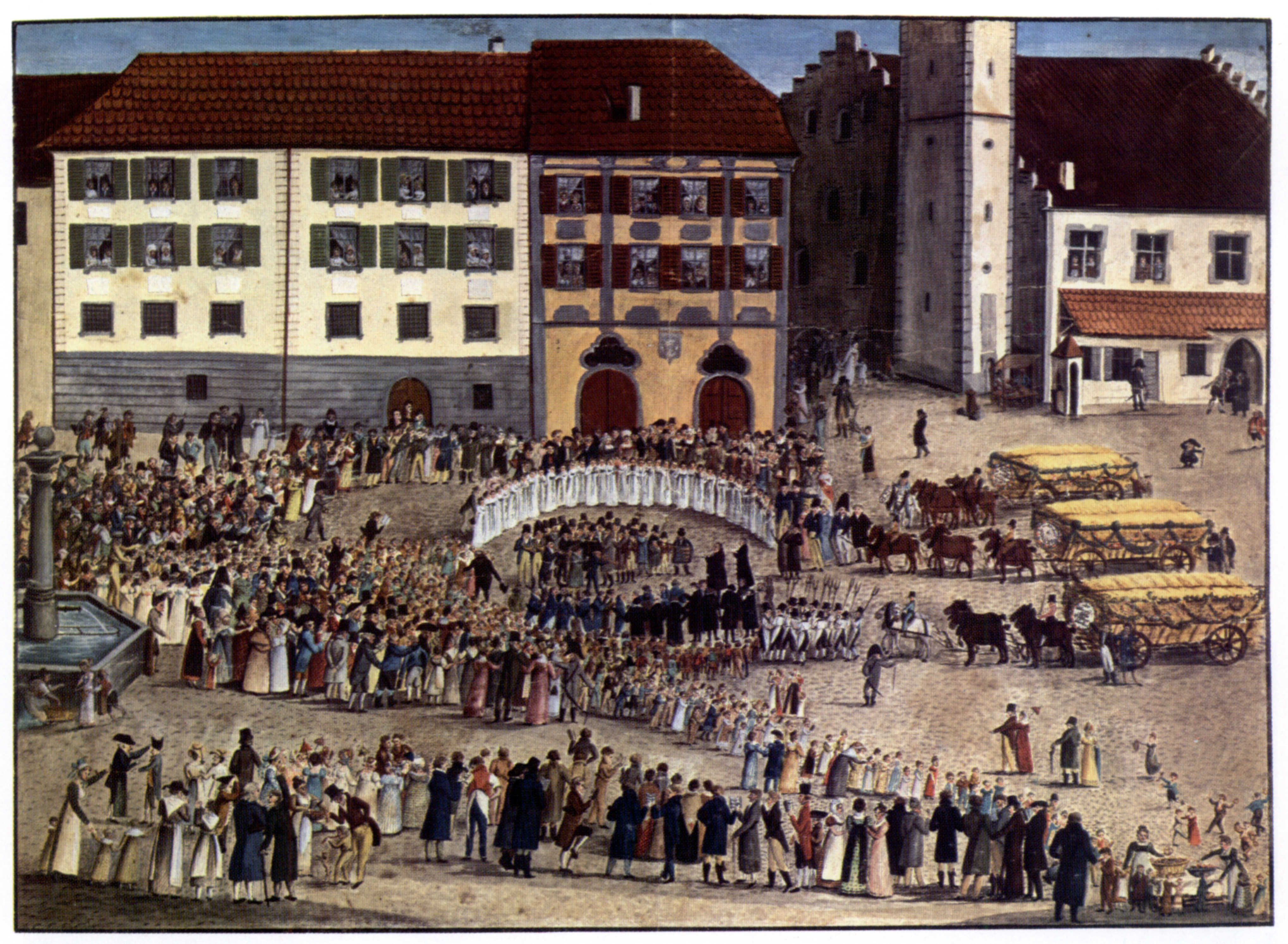 G. J. Edinger, Einzug der ersten Erntewagen nach der großen Hungersnot von 1816–1817 am 4. August 1817 auf dem "Platz" in Ravensburg, Gouache, 1817; Stadtarchiv Ravensburg (Schefold 6268)